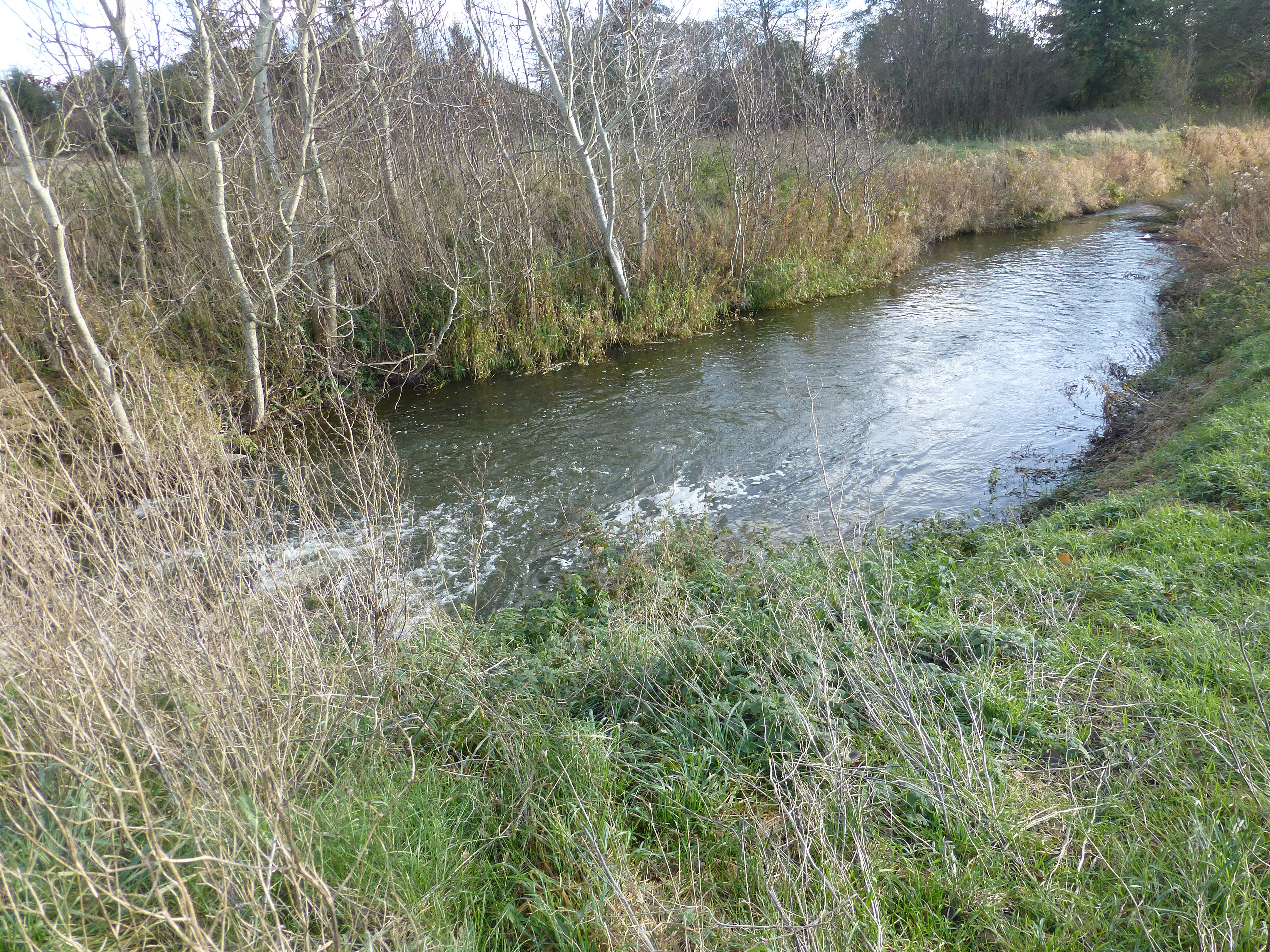 Havmølle Å er en knap 5 km lang å der danner forbindelsen mellem Stubbe Sø og Kattegat i Syddjurs Kommune på Djursland; Set mod øst